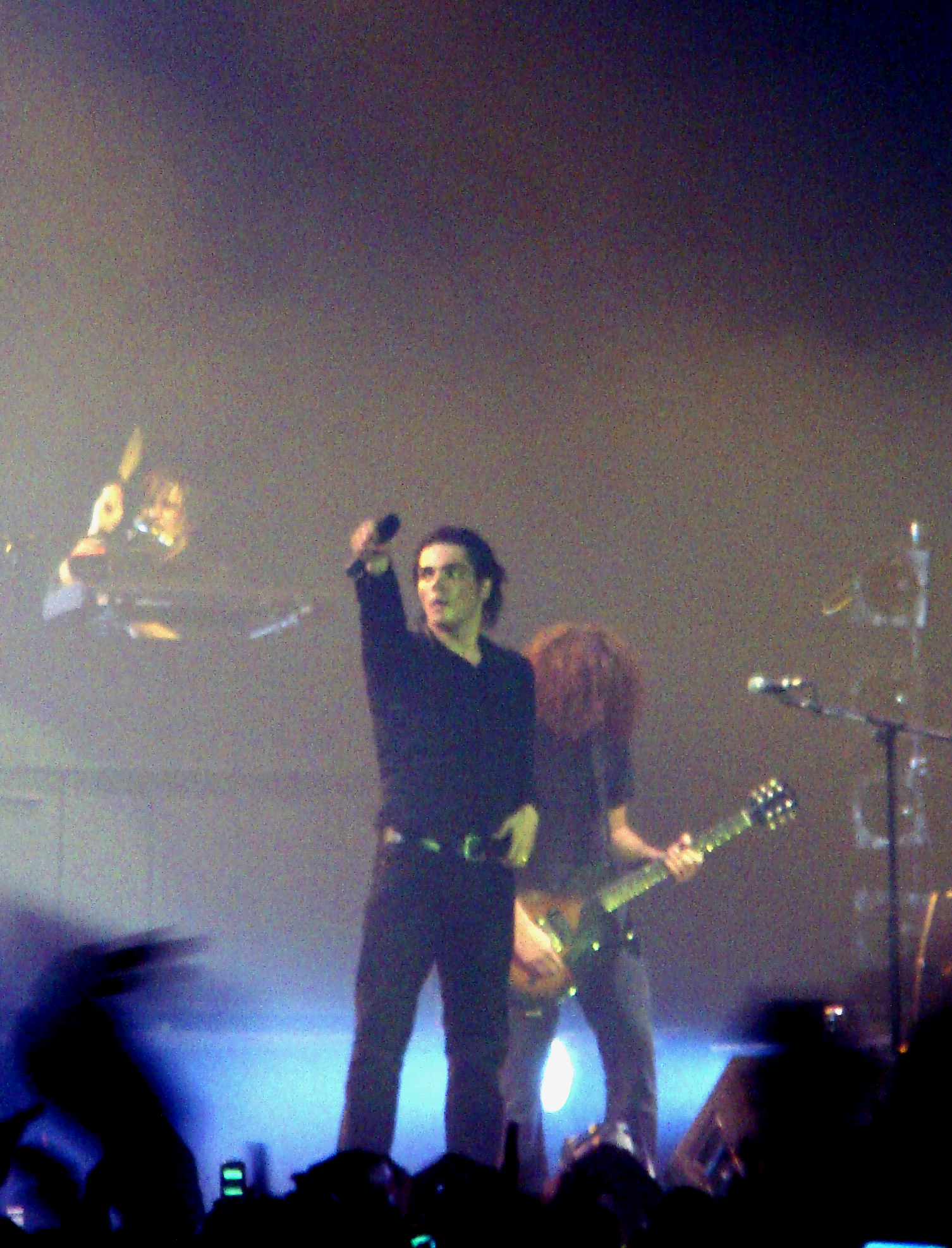 My Chemical Romance presentándose en vivo en el Metro Radio Arena de Newcastle, Inglaterra, Reino Unido, el 11 de noviembre de 2007. Seguramente estaban tocando la canción "Teenagers", por el instrumento que toca el teclista James Dewees.